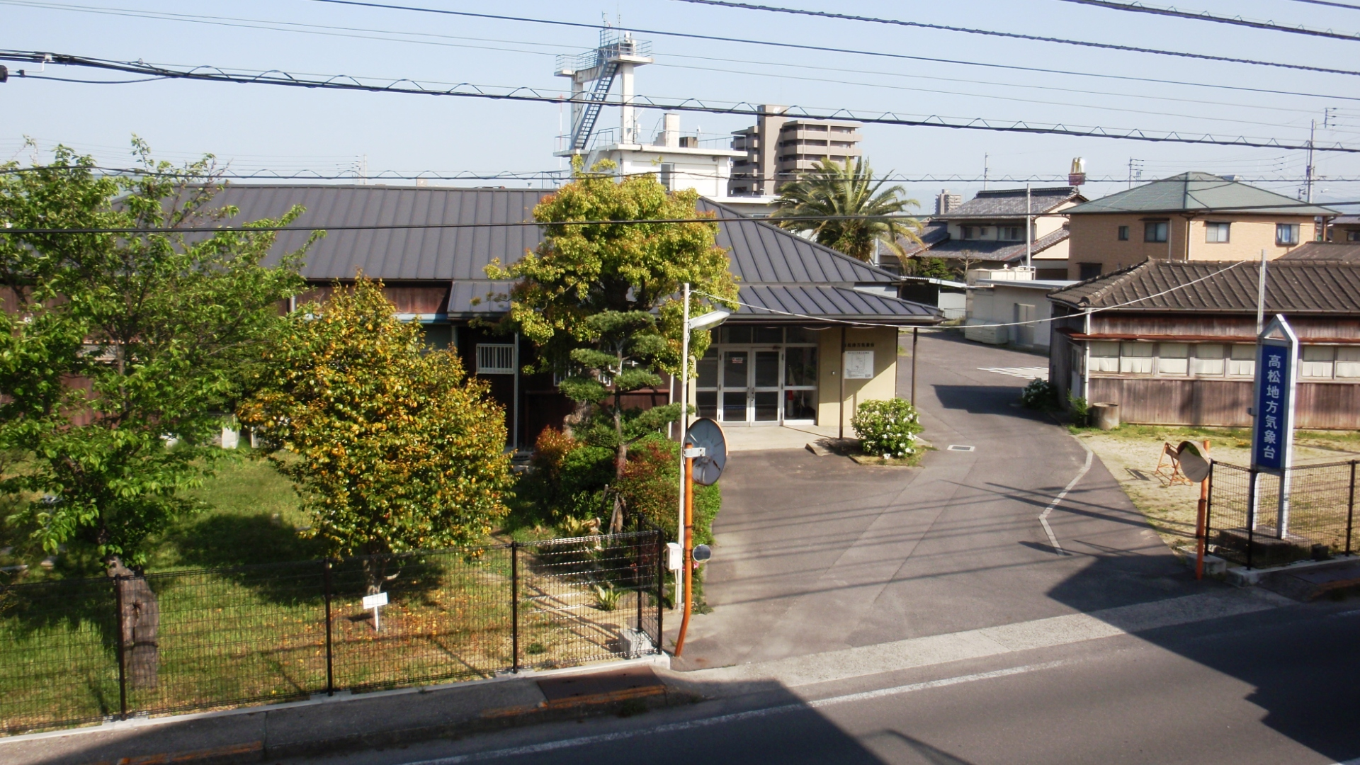 香川県高松市の高松地方気象台。